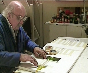 Portrait de Horacio Garcia Rossi